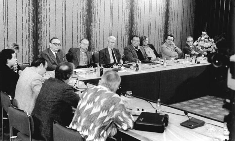 ADN-ZB Senft 6.5.87 Berlin: Schriftstellergespräch Die Leitung des Schriftstellerverbandes der DDR beantwortete im Palasthotel Fragen von Journalisten zum am 5.5. eröffneten internationalen Schriftstellergespräch "Berlin - ein Ort für den Frieden", zu dem der Verband eingeladen hatte. V.l.n.r.: Gerhard Henniger, Hermann Kant, Stephan Hermlin, Rudi Strahl, Hans Weber, Joachim Nowotny, Jurij Brezan.